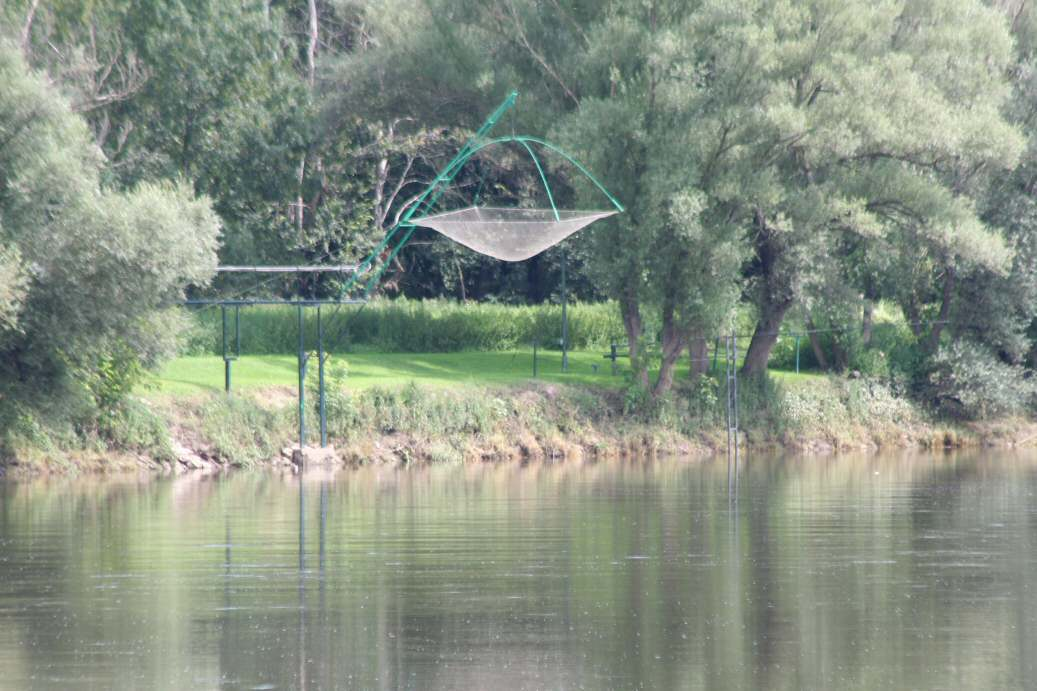 Daubel